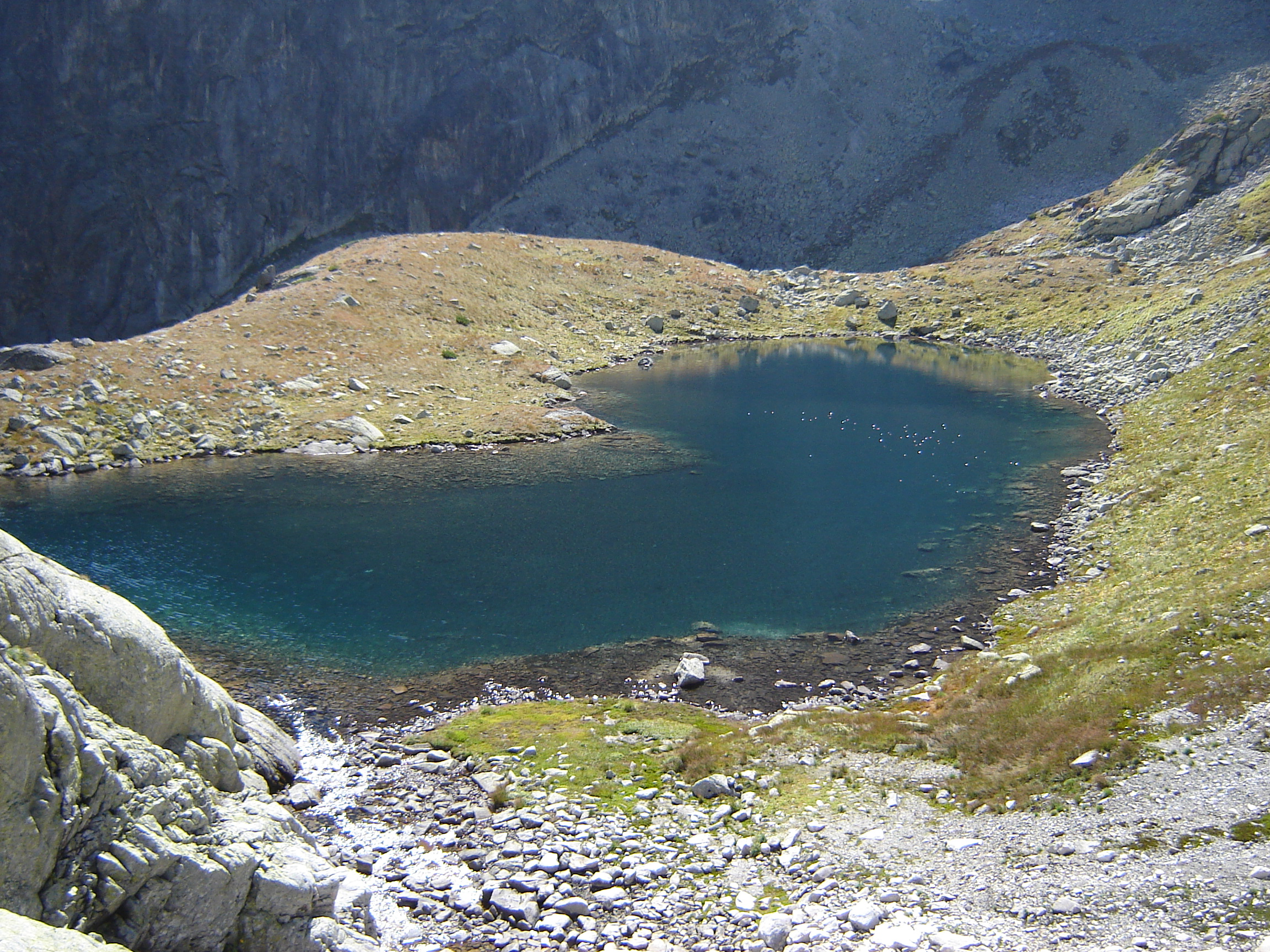 Nižné Spišské pleso